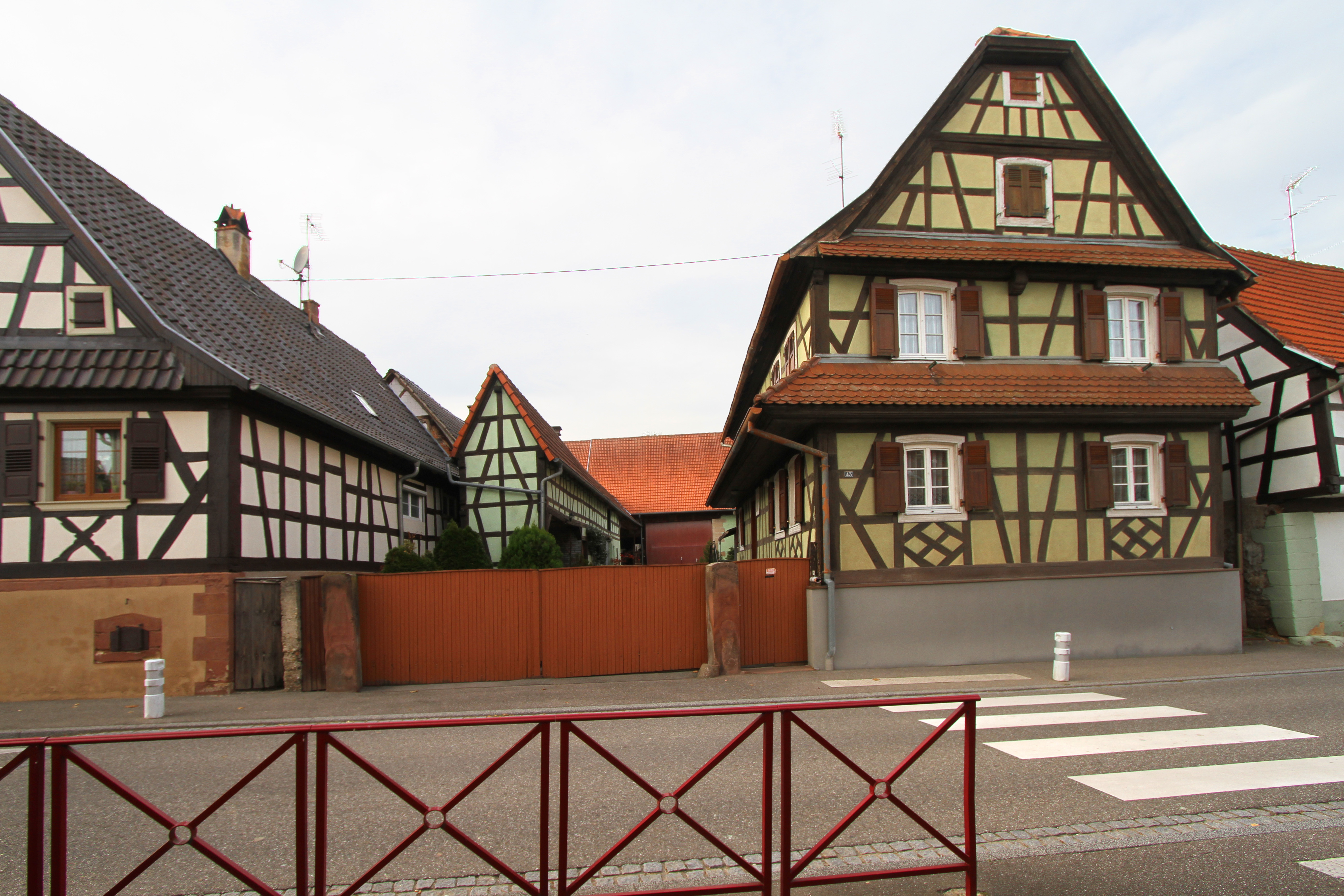 Riedseltz